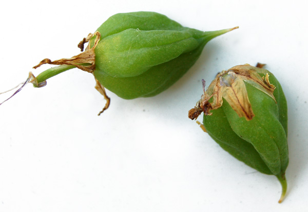 Fruit de Hyacinthoides × massartiana (Hyacinthoides non-scripta × Hyacinthoides hispanica)